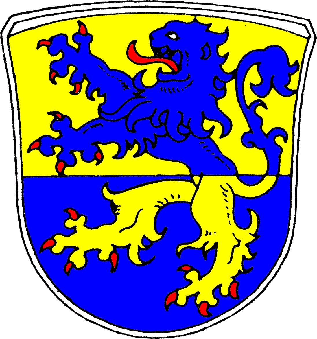 Wappen von Laubach